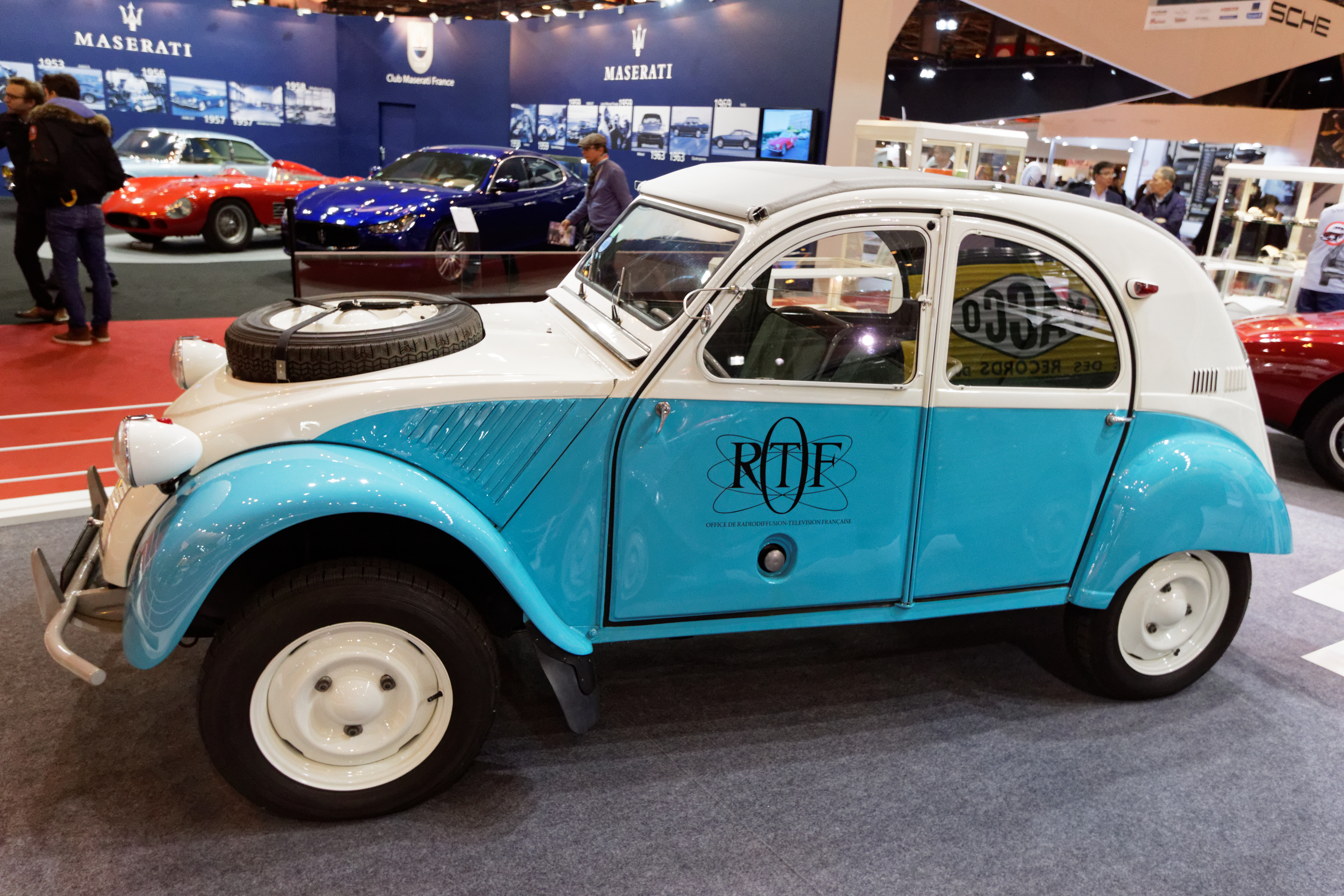 Une Citroën 2CV 4X4 Sahara de 1961 exposée lors du salon Rétromobile 2016.